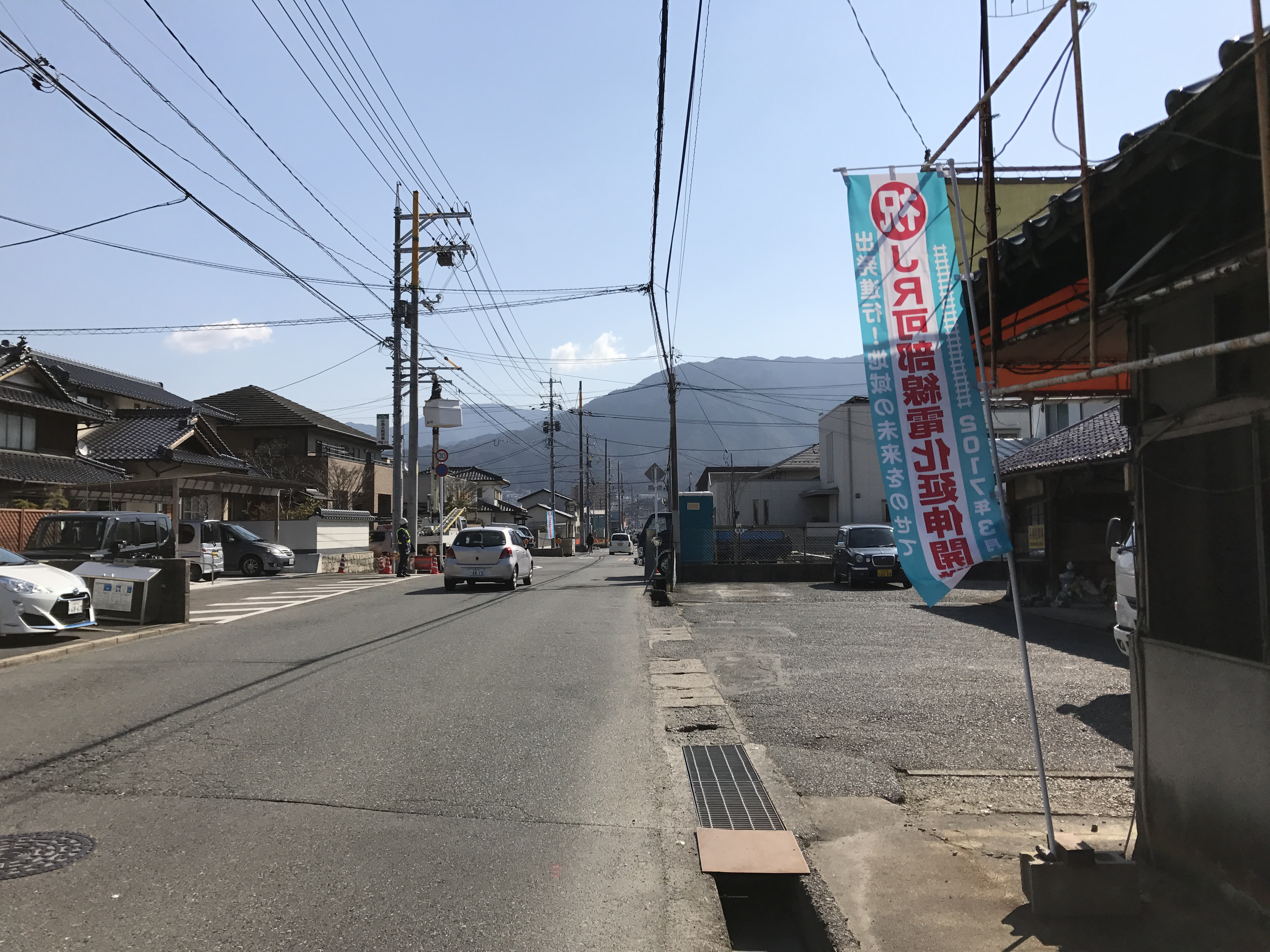 旧河戸駅付近の広島県道267号